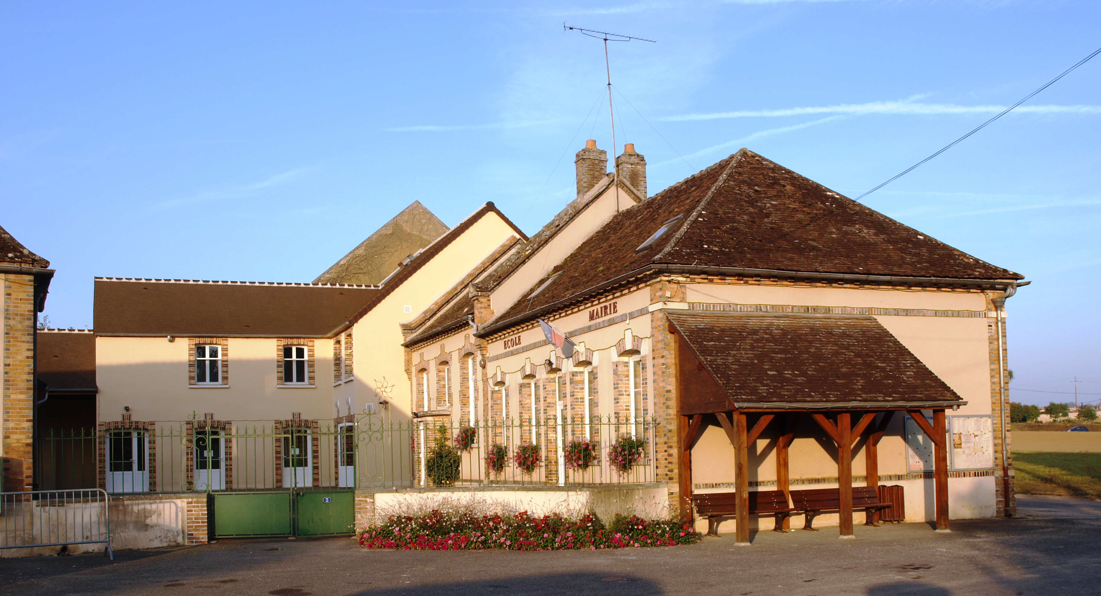 Dollot (Yonne, France)